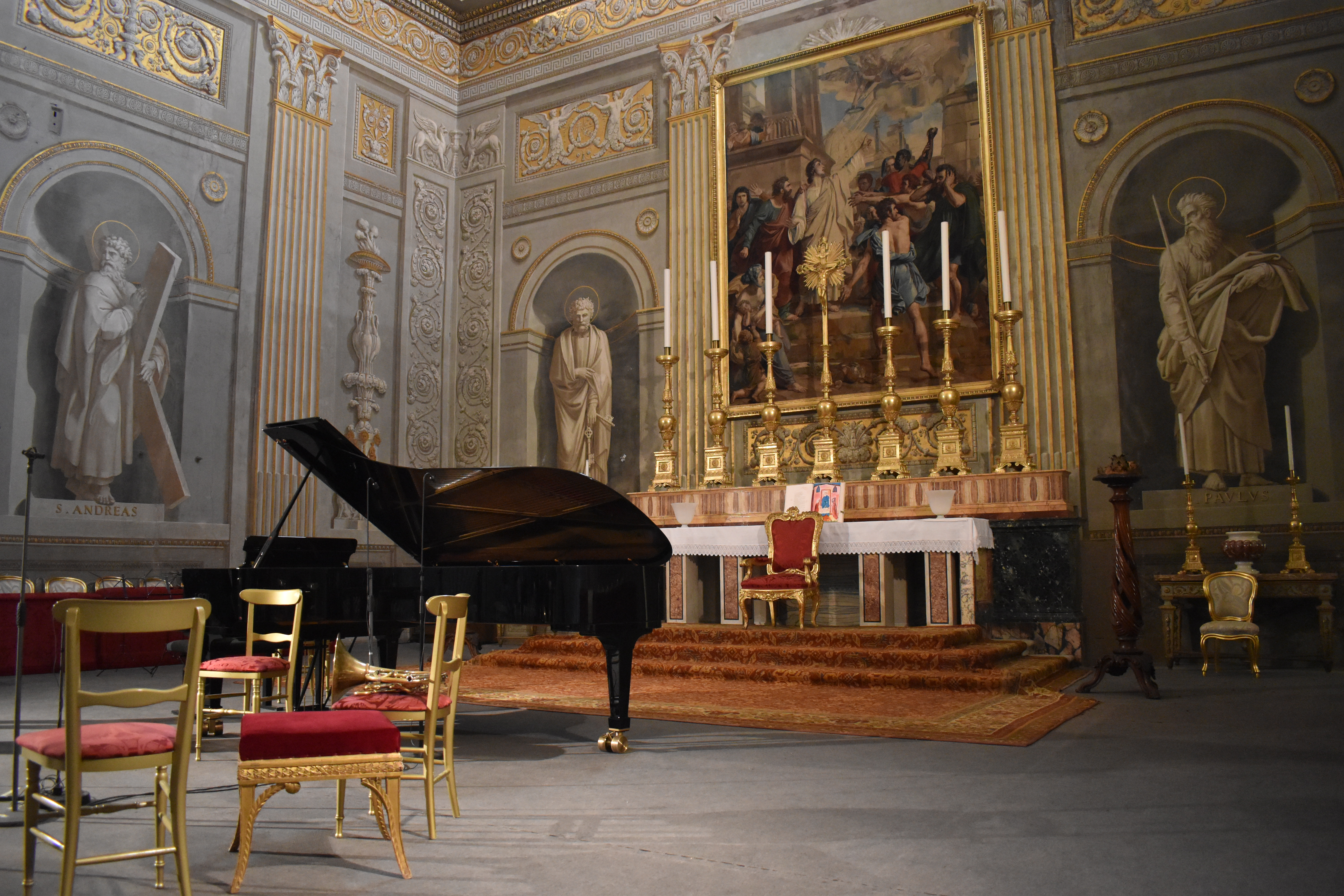 Dopo il concerto alla Cappella Paolina, Palazzo del Quirinale, Roma.